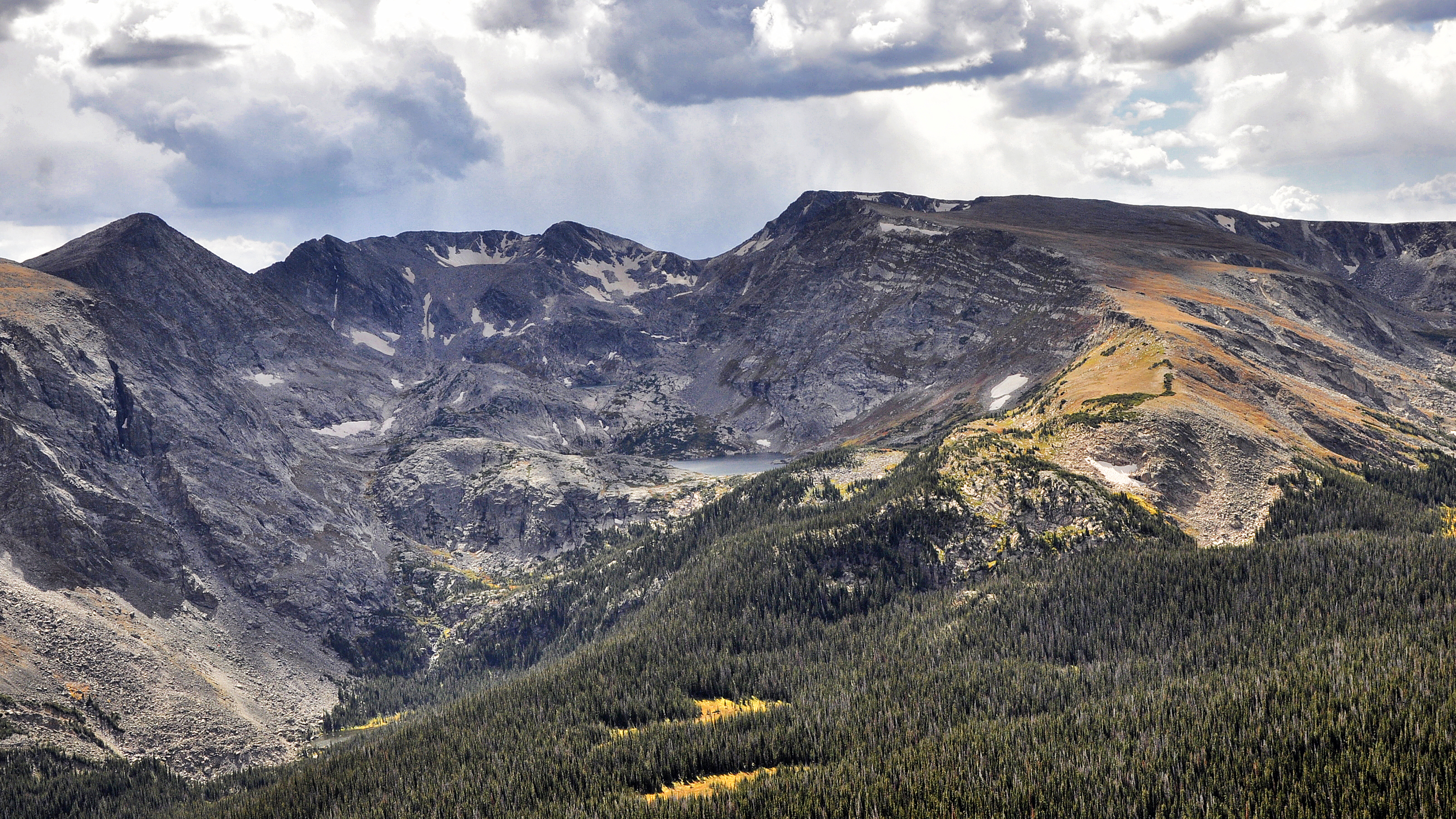 Mount Ida (hoogste berg op de foto) en Azure Lake aan de voet van Mount Ida - Rocky Mountain NP - Colorado, USA